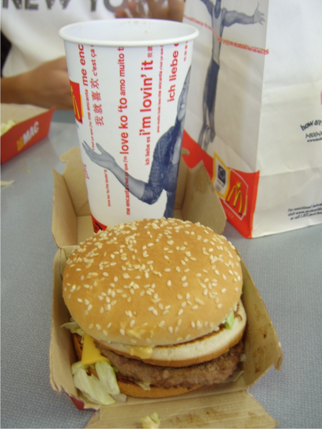 Der Bigmac. Der typischste Burger für McDonald's. Ort: Rhode Island / USA --Nize 22:30, 23. Okt 2005 (CEST)